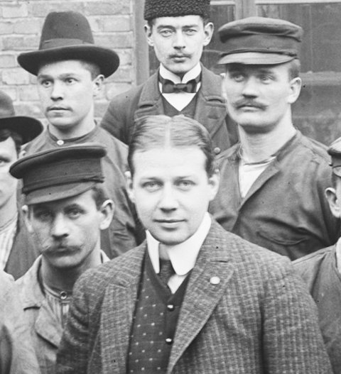 Gustaf L M Ericsson med anställda